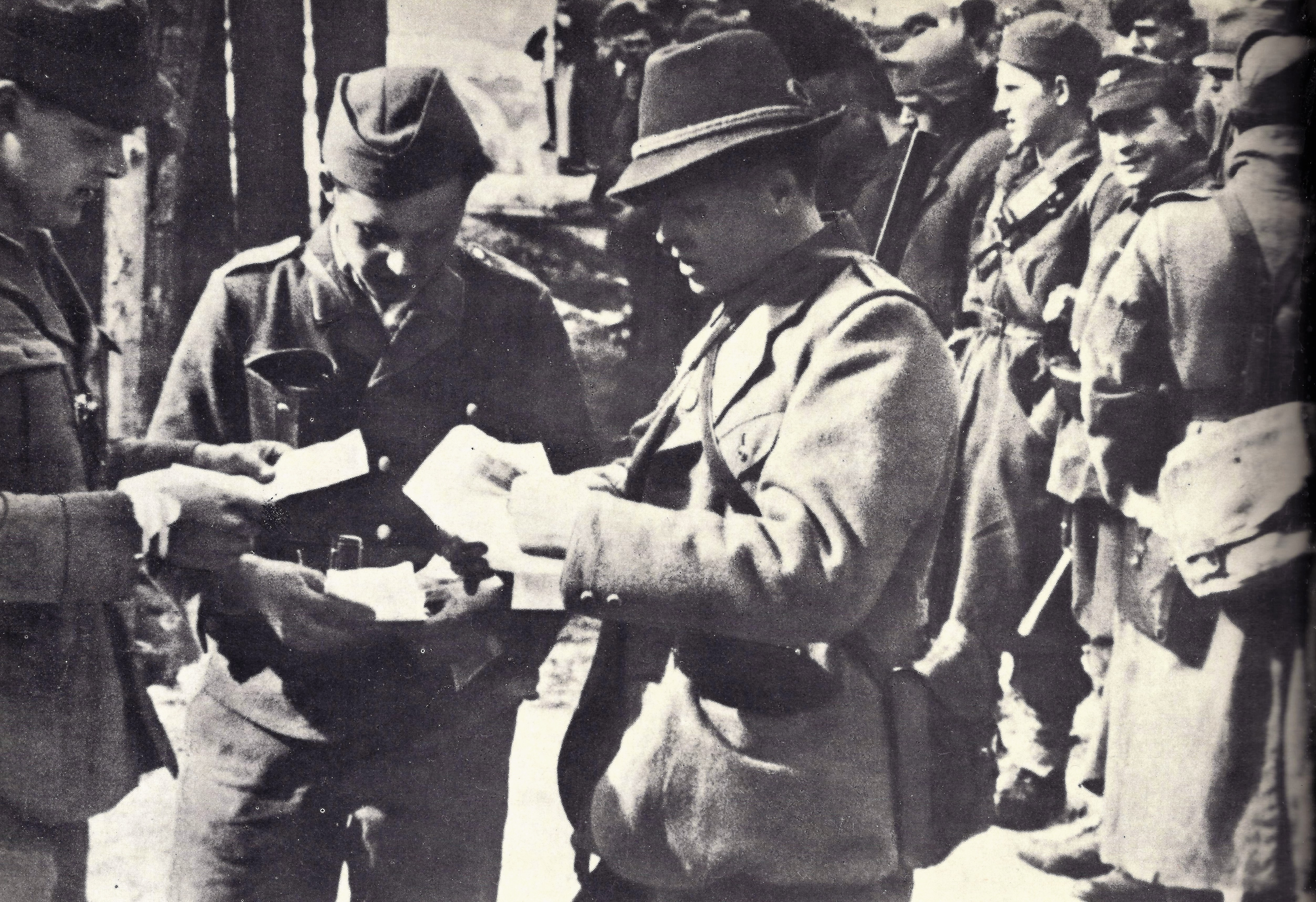 Na Graški gori 22. marec, z desne komandat brigade Mićo Došenovič, zraven politikomisar Miha Butara in njegov namestnik Bojan Škrk